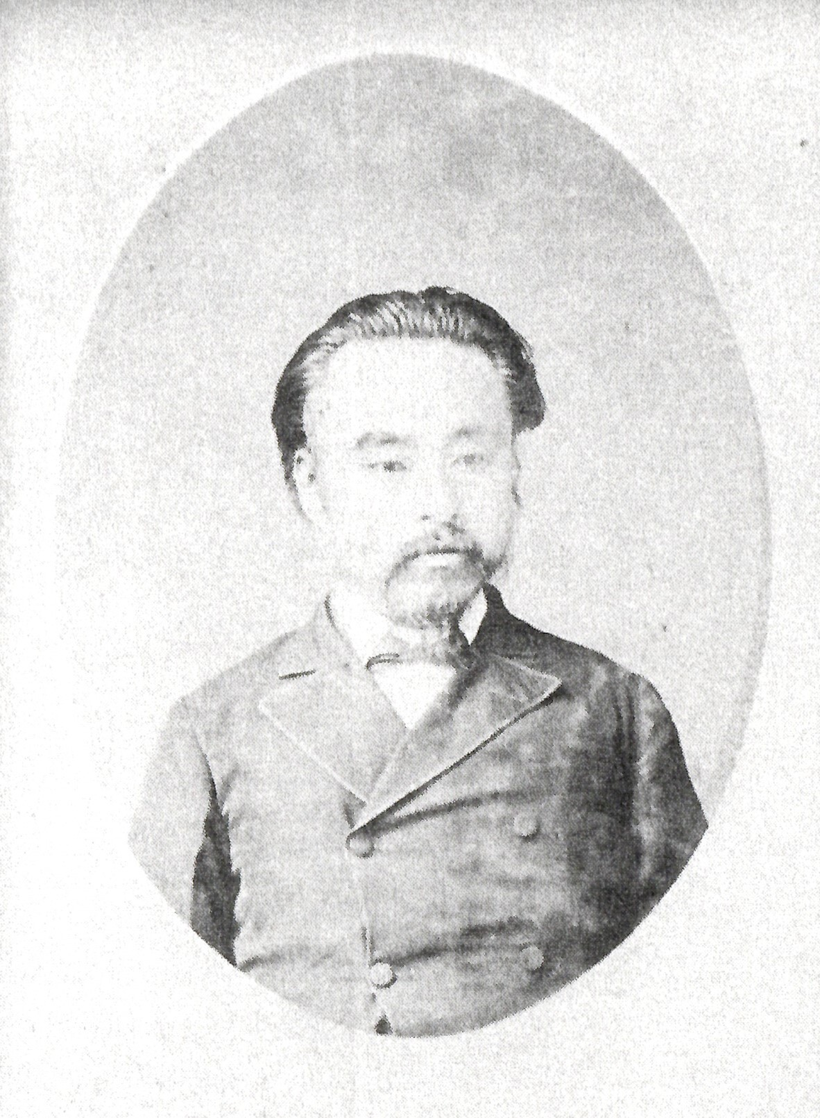 五条為栄の肖像写真。